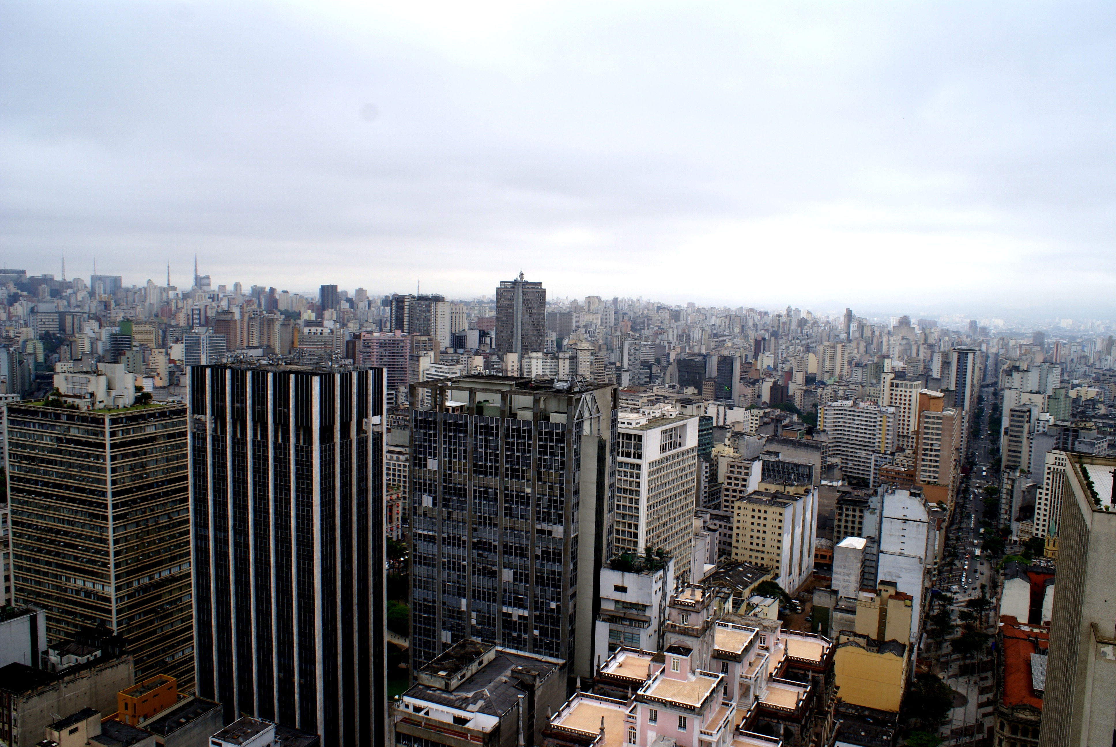 Panorama Urbano do Centro Antigo de São Paulo, Brasil. - Old Downtown Skyline's of São Paulo, Brazil.